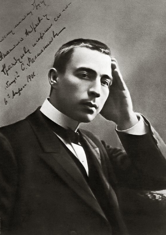 Sergei Rachmaninoff, in 1906